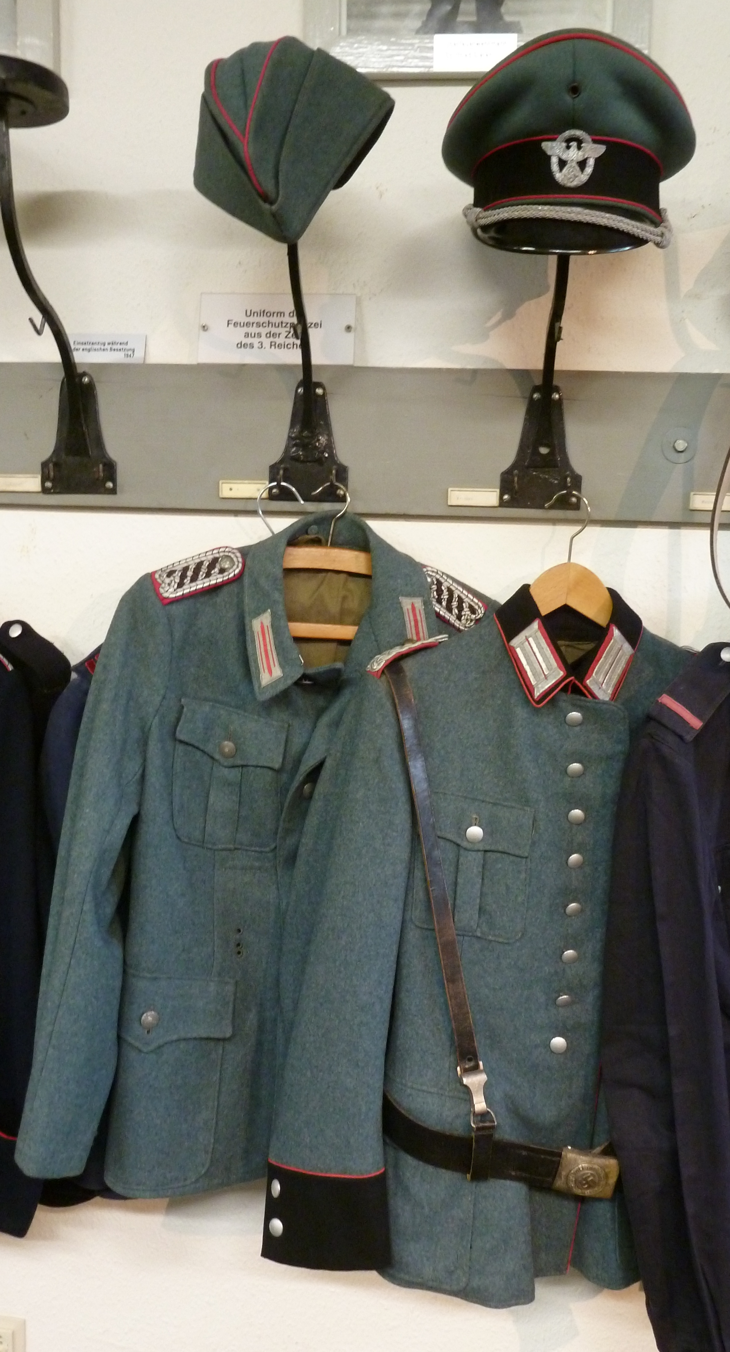 Historische Lehrsammlung der Berufsfeuerwehr Köln: Feuerwehruniformen aus der NS-Zeit